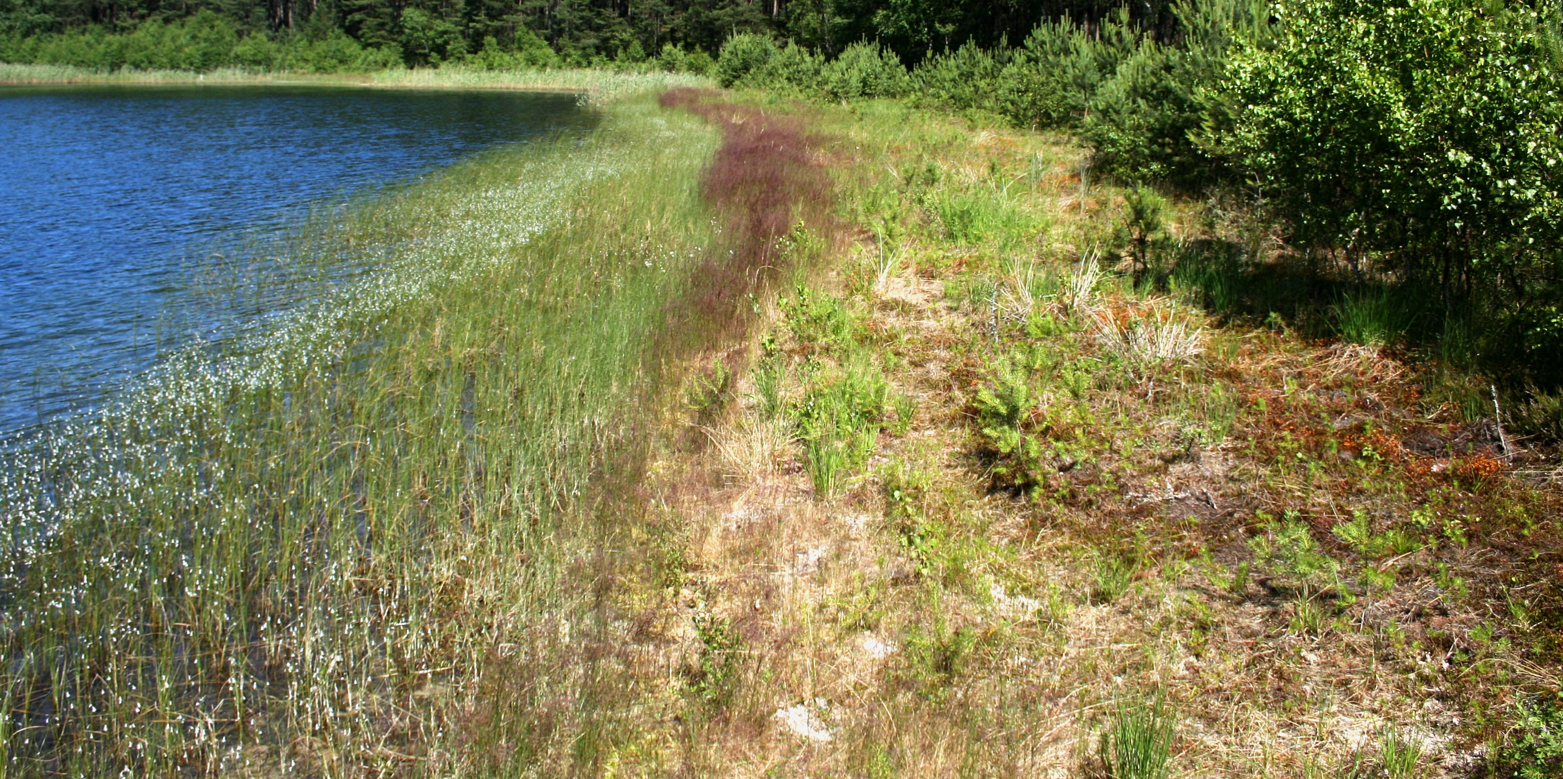 Park Narodowy Bory Tucholskie, pasy roślninnosci na nadbrzeżu jeziora Wielkie Gacno